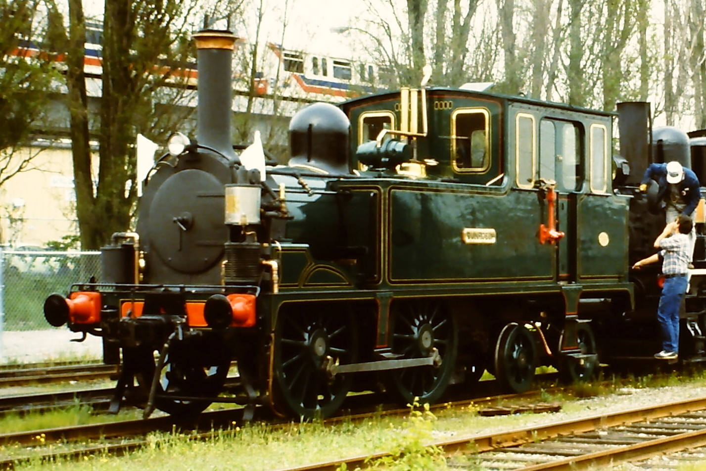 Dampflokomotive Dunrobin auf der SteamExpo 86 in Vancouver